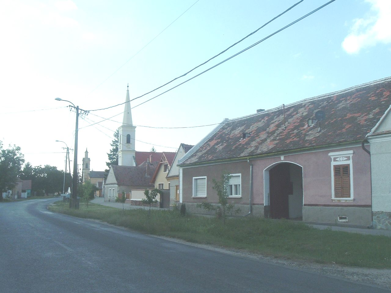 Szakony, Hungary